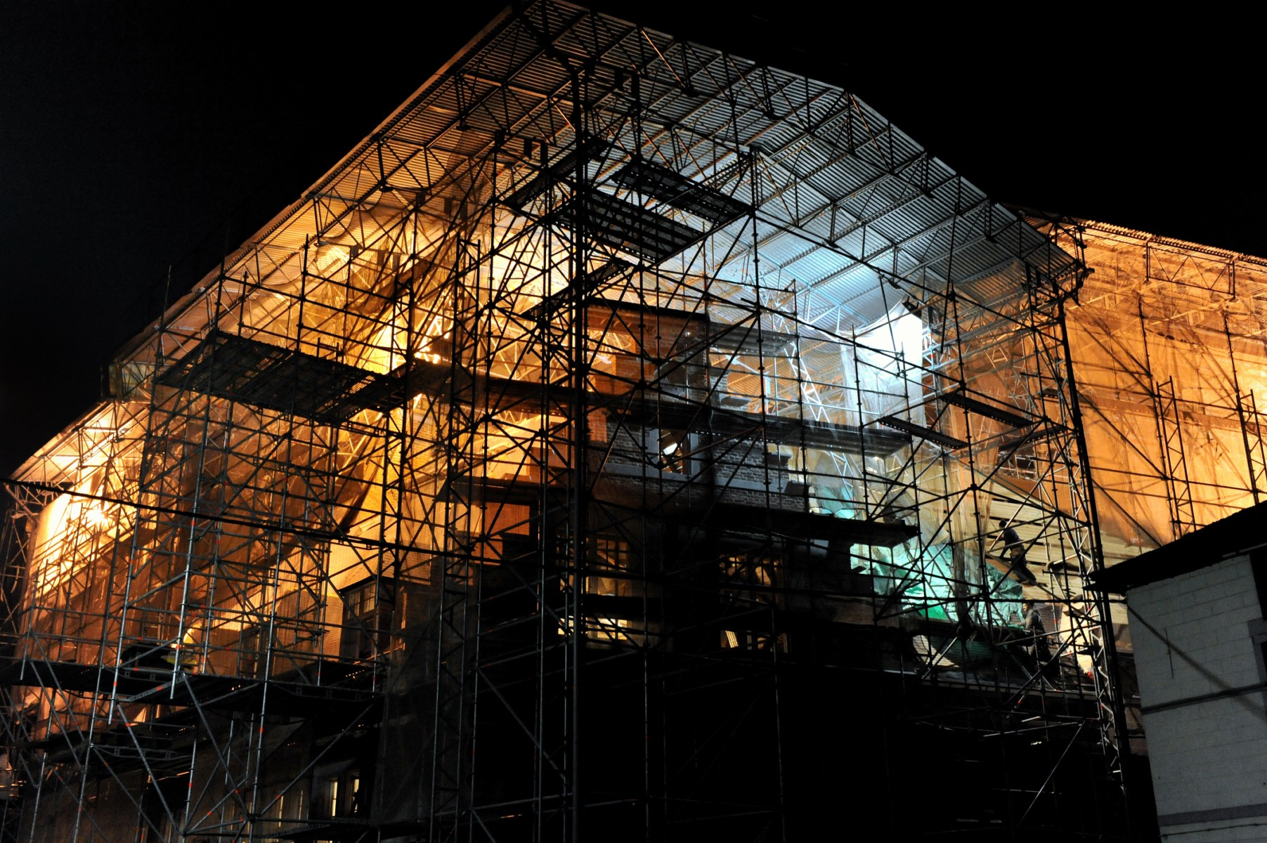 les toits